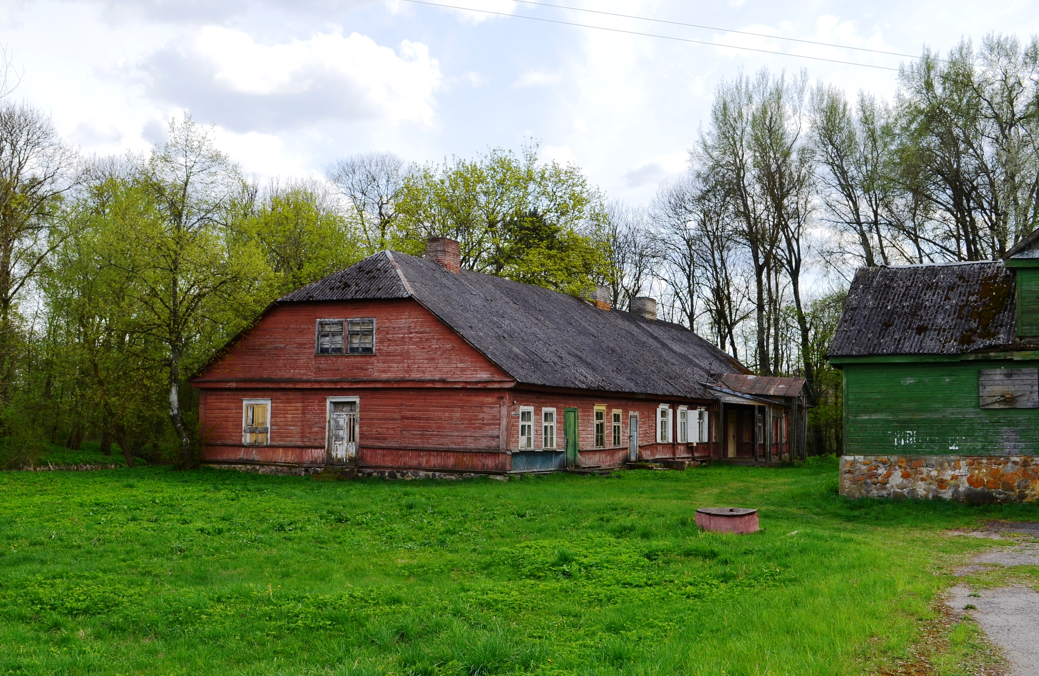 Dvaro liekanos, Vaiškonių k., Kėdainių raj.